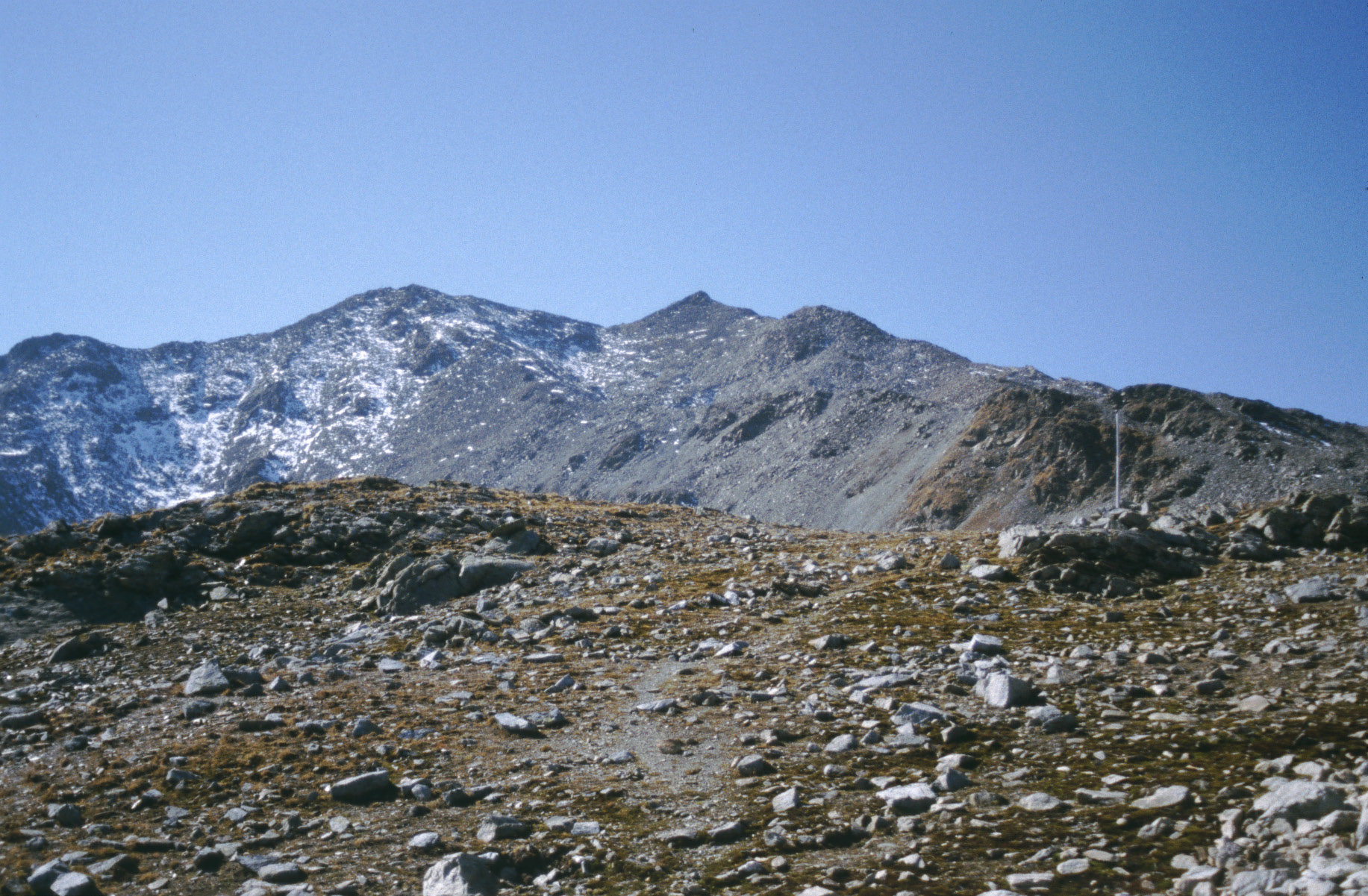 Nauderer Hennesiglspitze von Nordosten